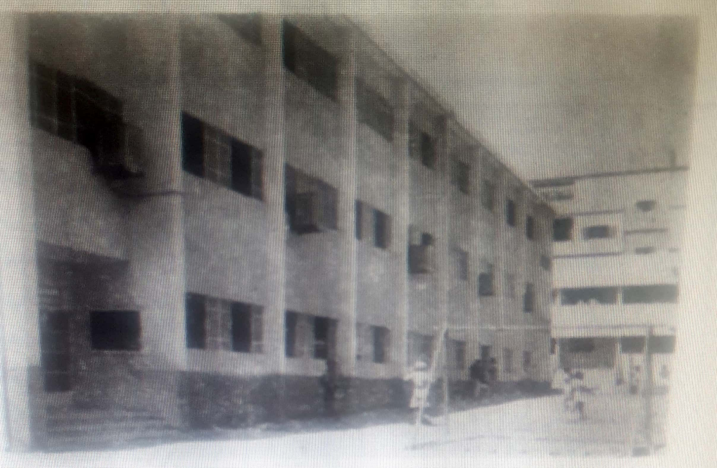 صورة المبنى الحكومي لمدرسة الناصرية